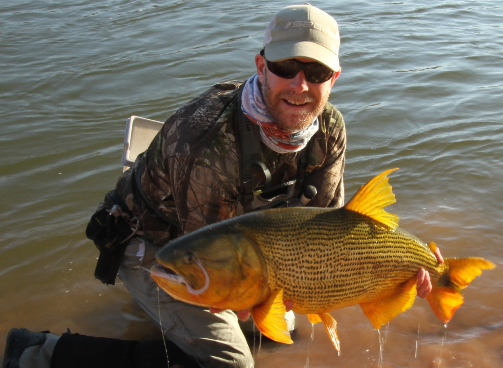 Pesca de dorados en el Río Juramento, Provincia de Salta (Argentina).